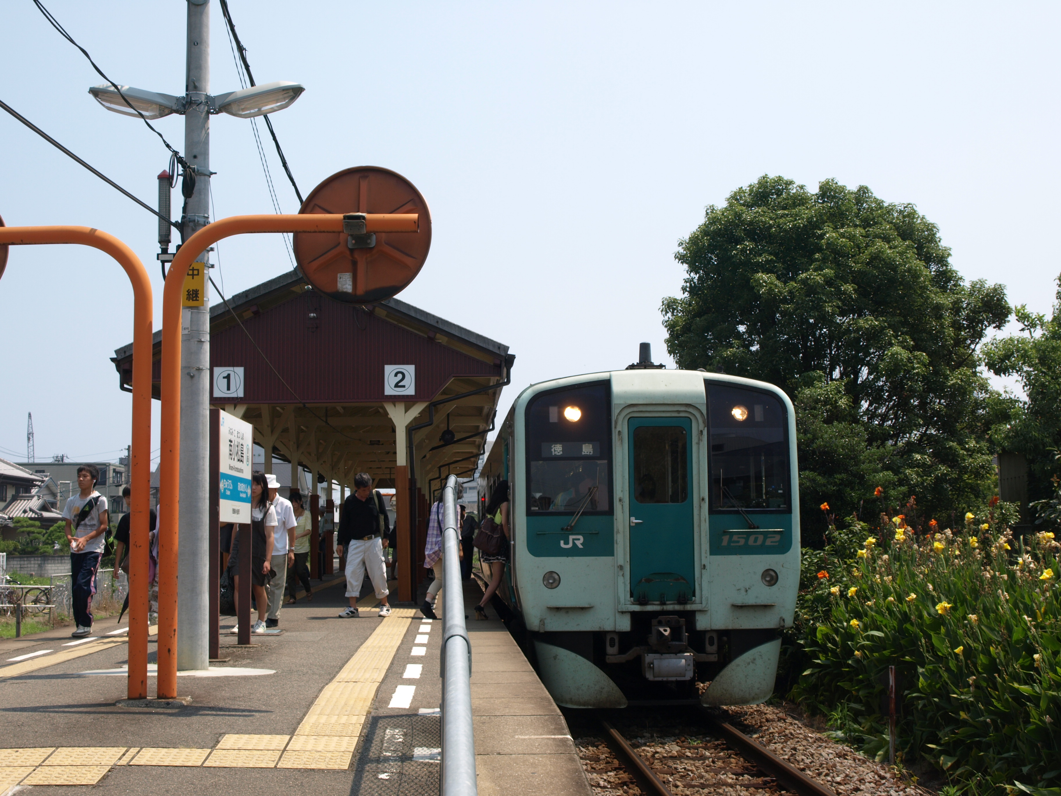 南小松島駅プラットフォームです